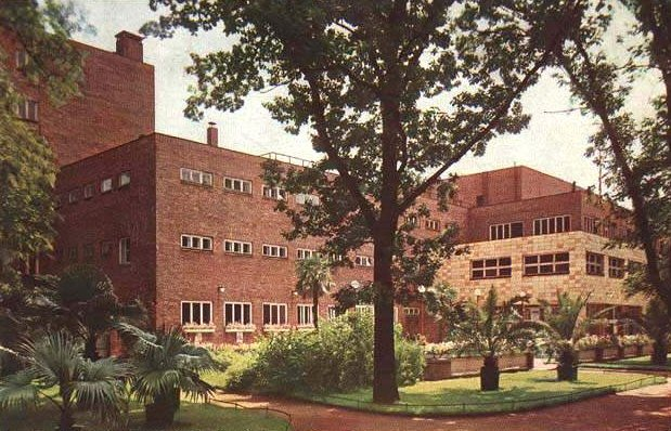 Kąpielisko kryte w Parku Miejskim - pocztówka z ok. 1940 r.